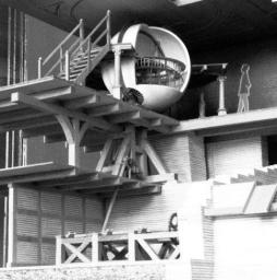 Ausschnitt eines Modells des Globushauses von Felix Lühning.